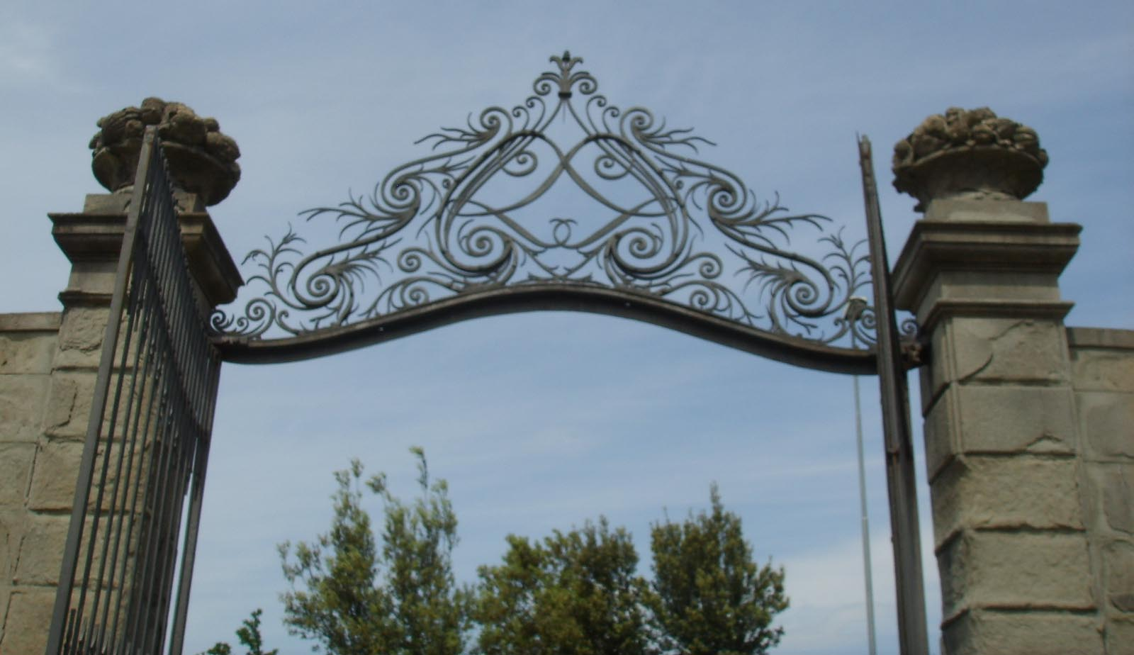 Villa di maiano cancellata ingresso